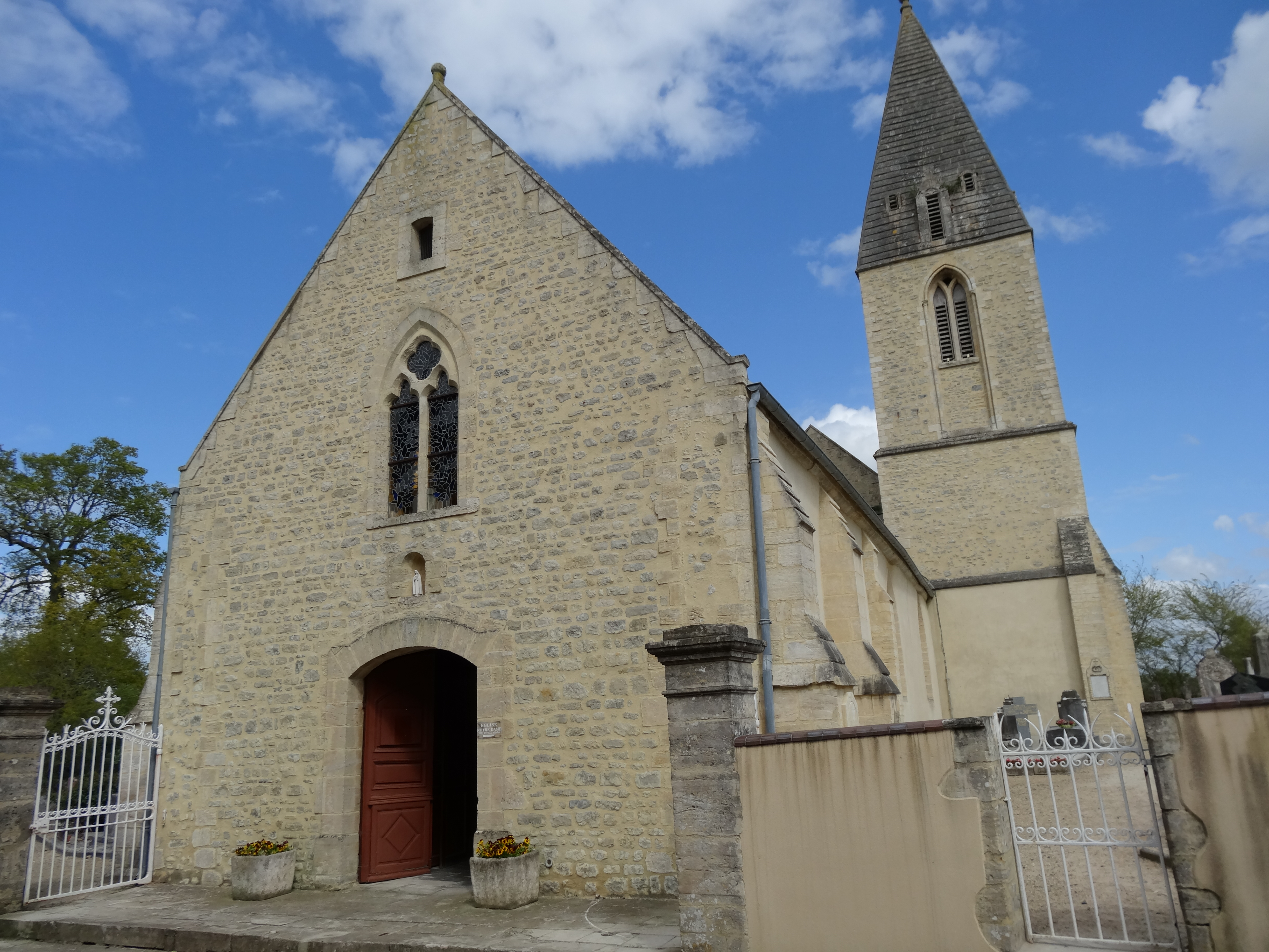 façade occidentale et clocher de l'église de Mandeville-en-Bessin